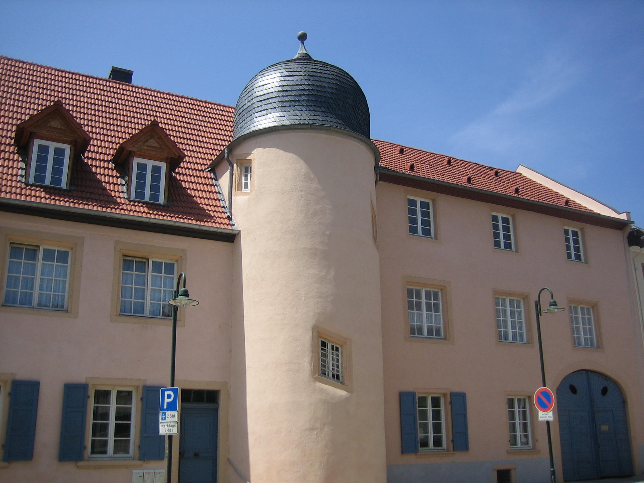 Obentrautscher Hof in Groß-Winternheim. Ehemaliger Adelshof (Weingut); Hofanlage, 16. bis 19. Jahrhundert; Renaissancebau vom Ende des 16. Jahrhunderts, ehemalige Zehntscheune mit Wellengiebel, wohl späteres 16. Jahrhundert, Gewölbestall bezeichnet 1861